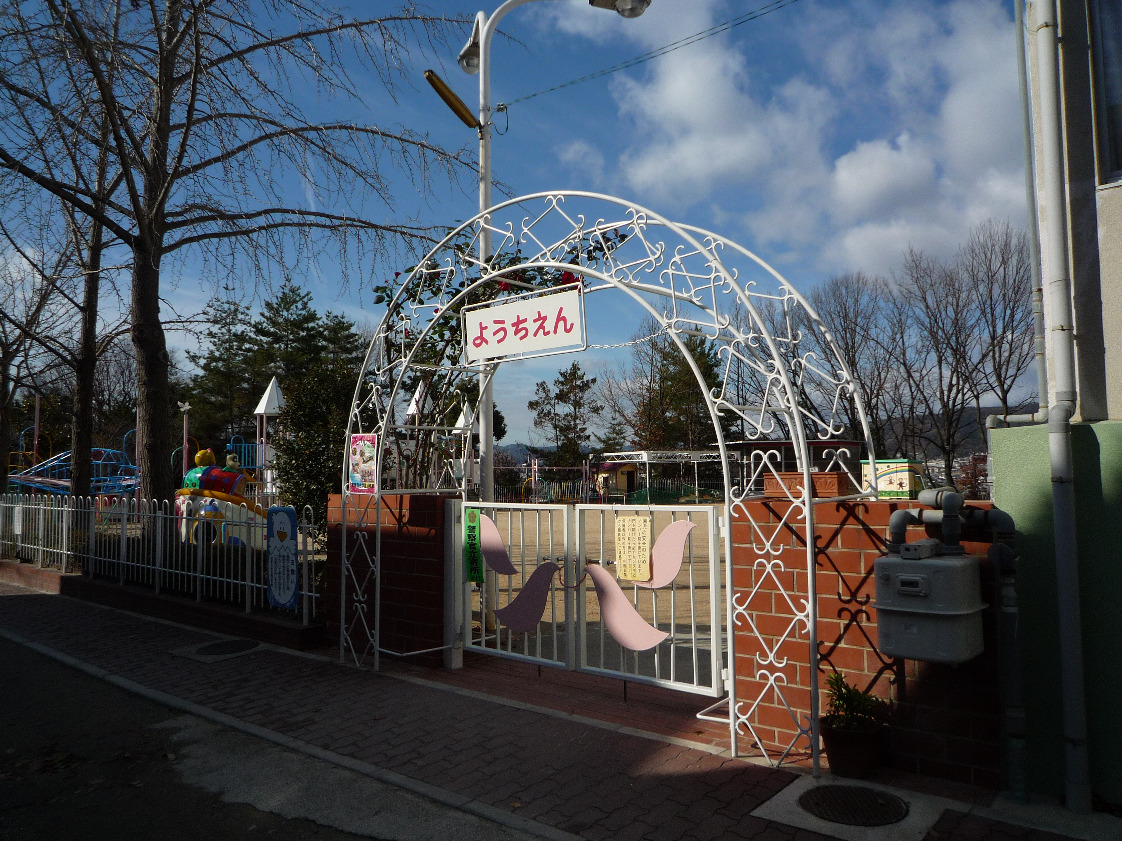 箕面自由学園幼稚園